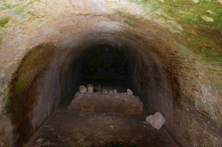 Sótano de un almacén de la Casa de Arizón en Sanlúcar de Barrameda